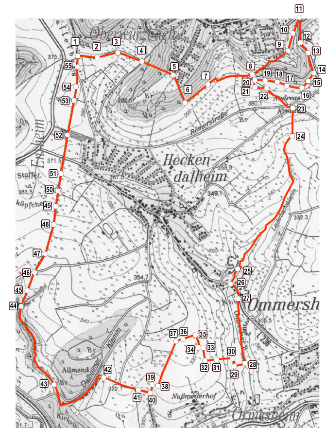 Banngrenze Heckendalheim